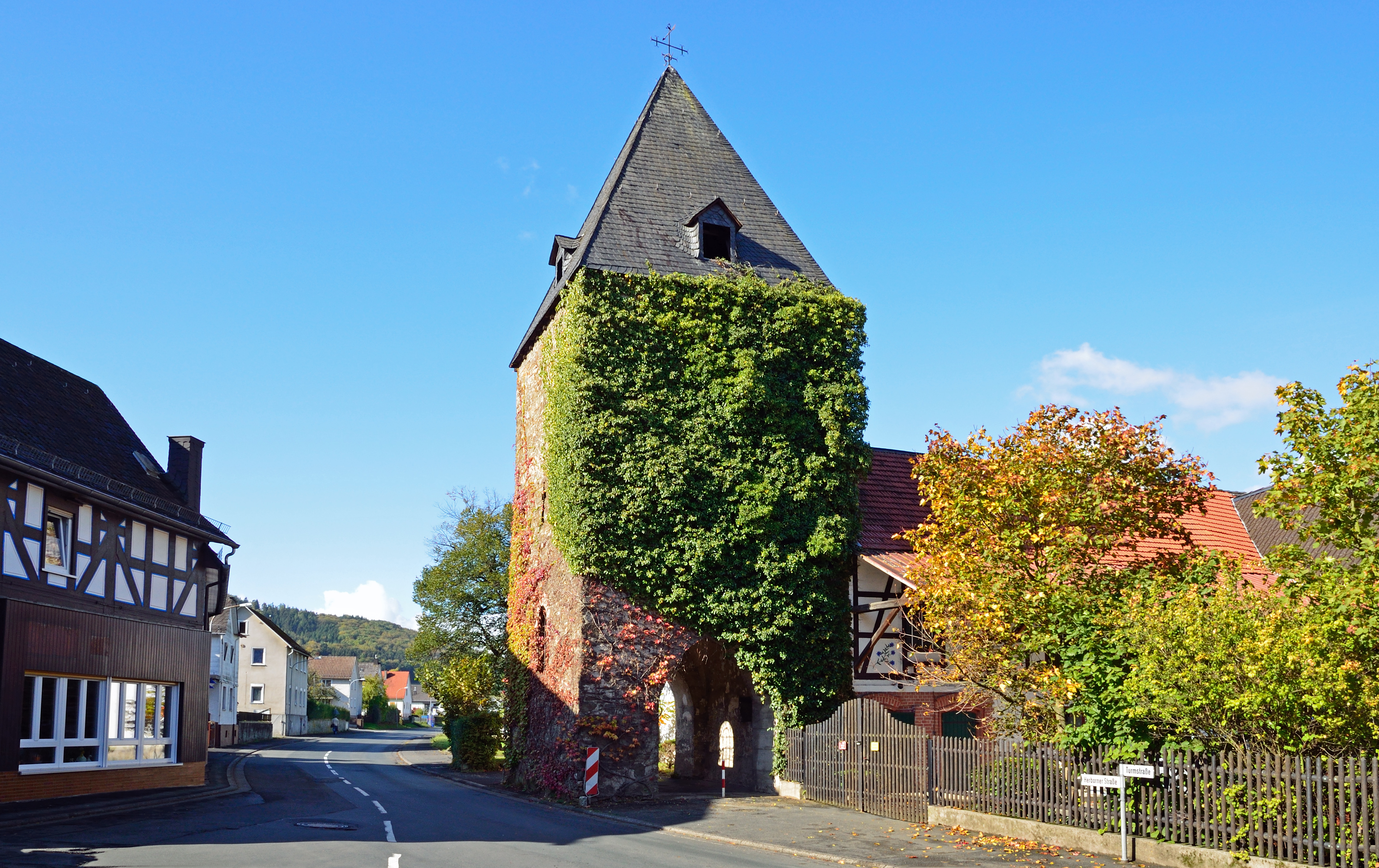 Chorturm der ehemaligen ev. Kapelle in Erdhausen, aus dem 13. Jh.